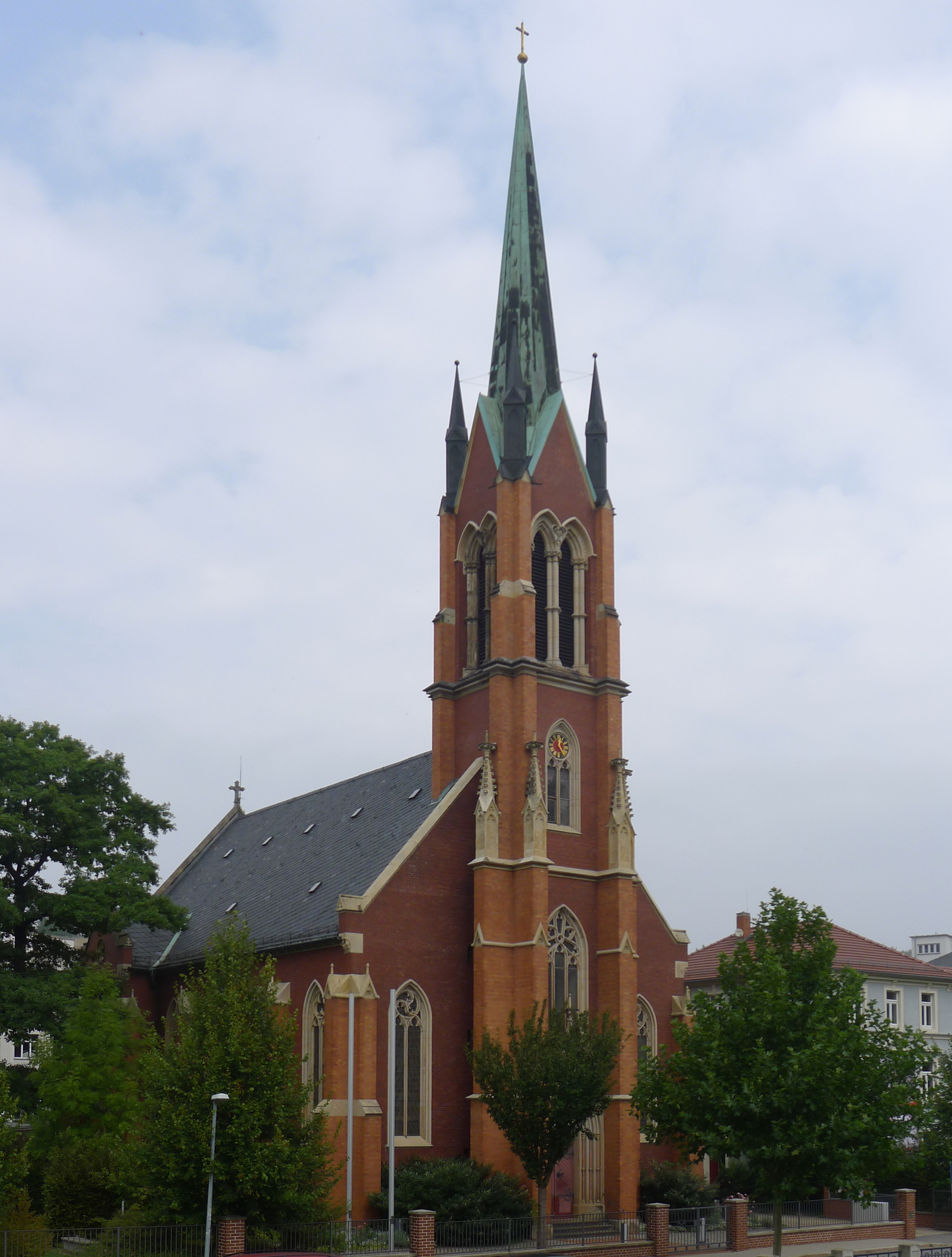 römisch-katholische Pfarrkirche St. Benno in Meißen (Elbe); erbaut 1883-1887